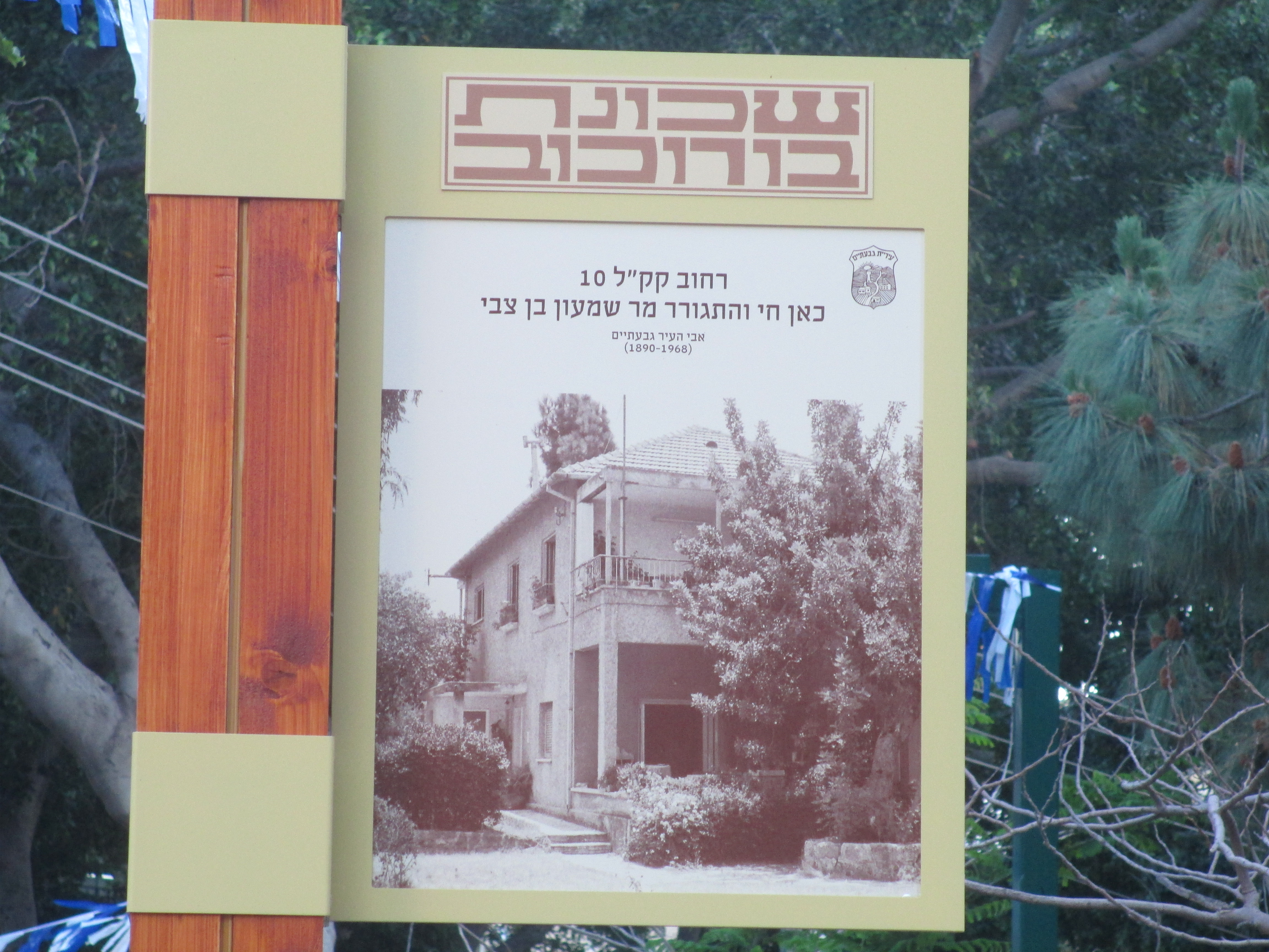 ביתו המקורי של שמעון בן צבי ברחוב קק"ל 10 בגבעתיים